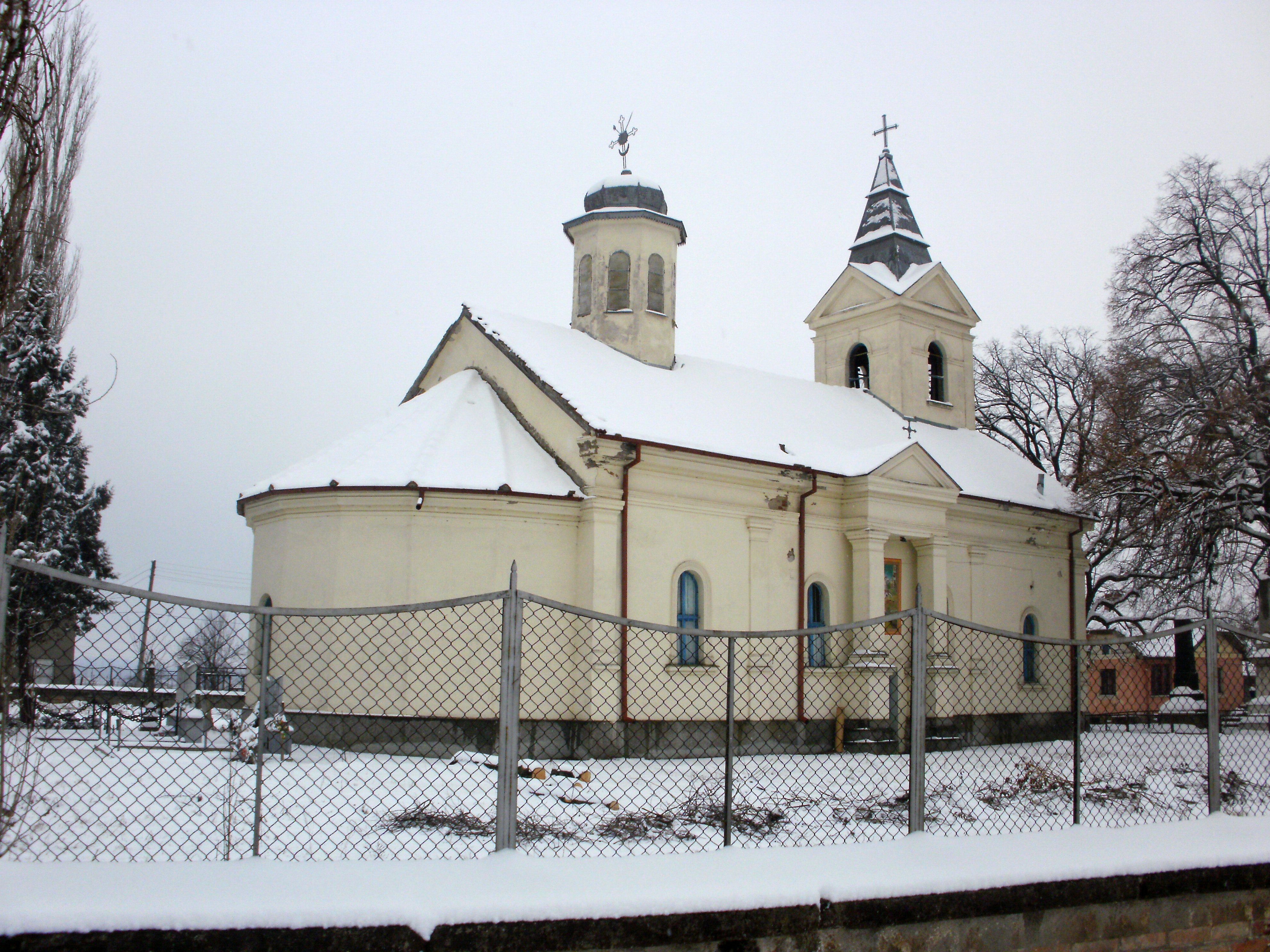 "Св. Георги" в Антимово, Видинско